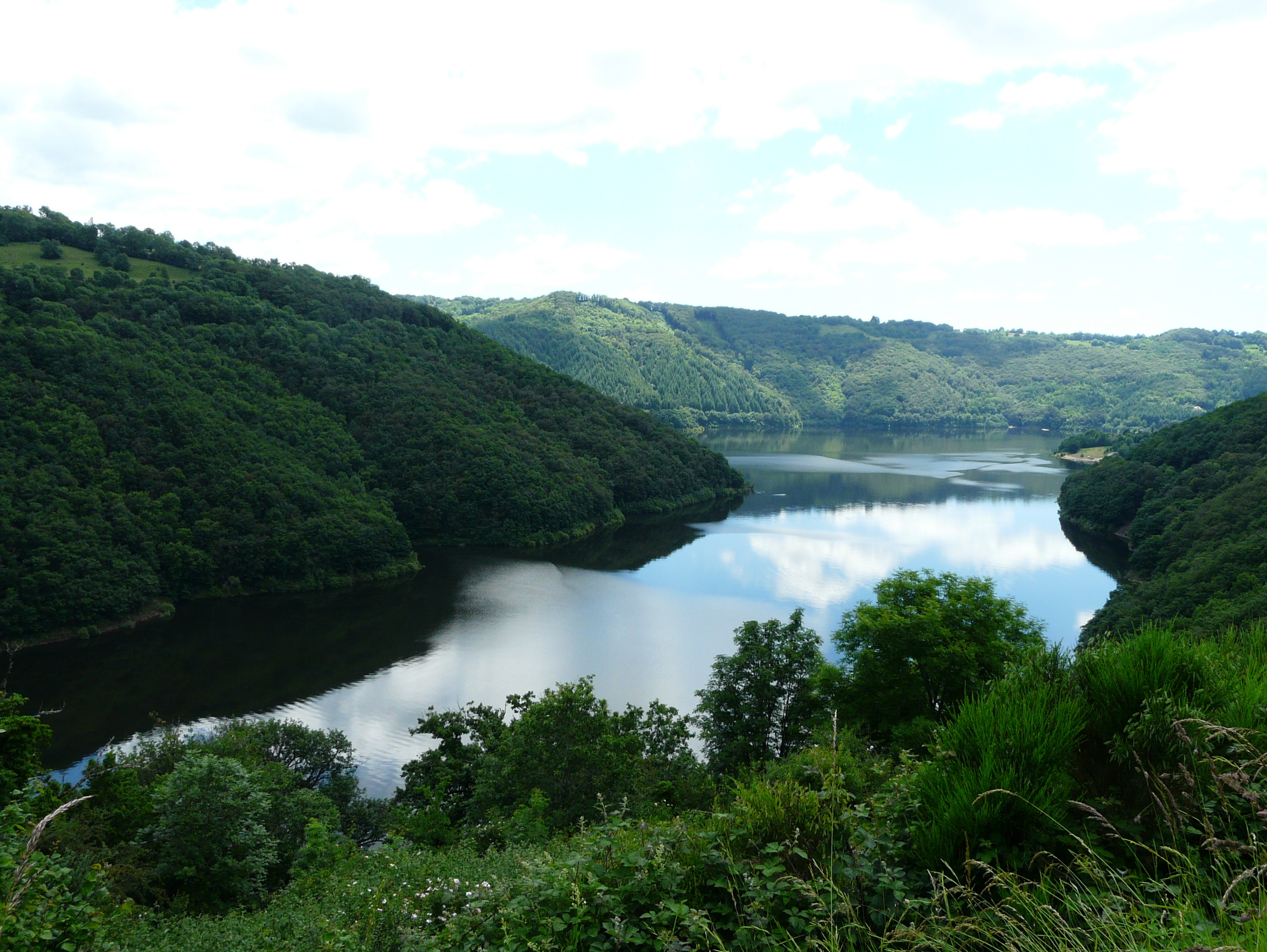 Le lac de retenue du barrage de Sarrans, gorges de la Truyère vues depuis la route départementale 34, commune de Paulhenc, Cantal, France.